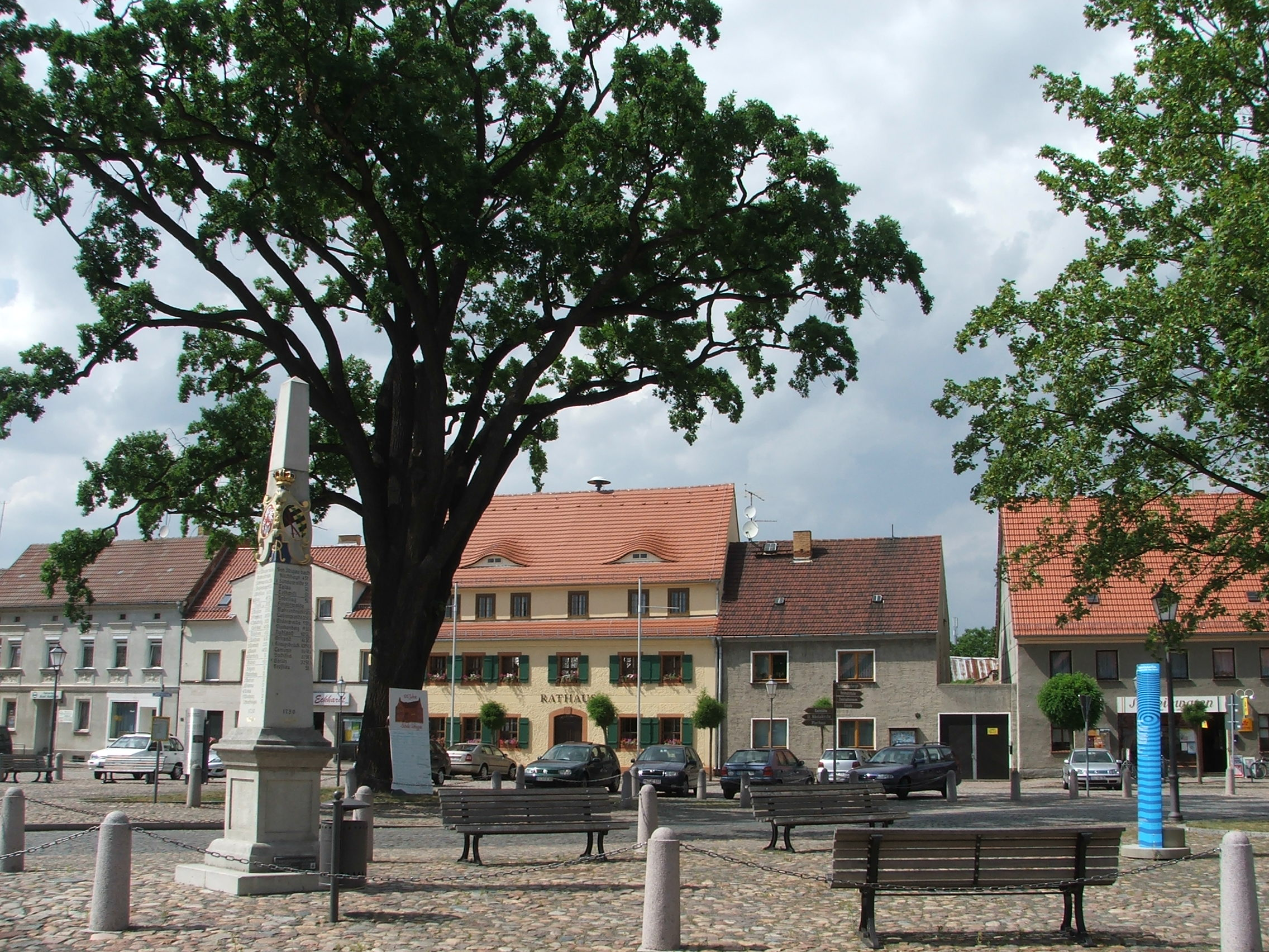 Marktplatz in Uebigau mit Postsäule